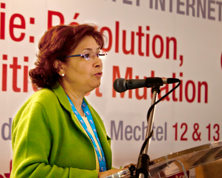 Sihem Bensedrine s'exprimant durant le colloque Média et Internet sur la Tunisie le 12 janvier 2012